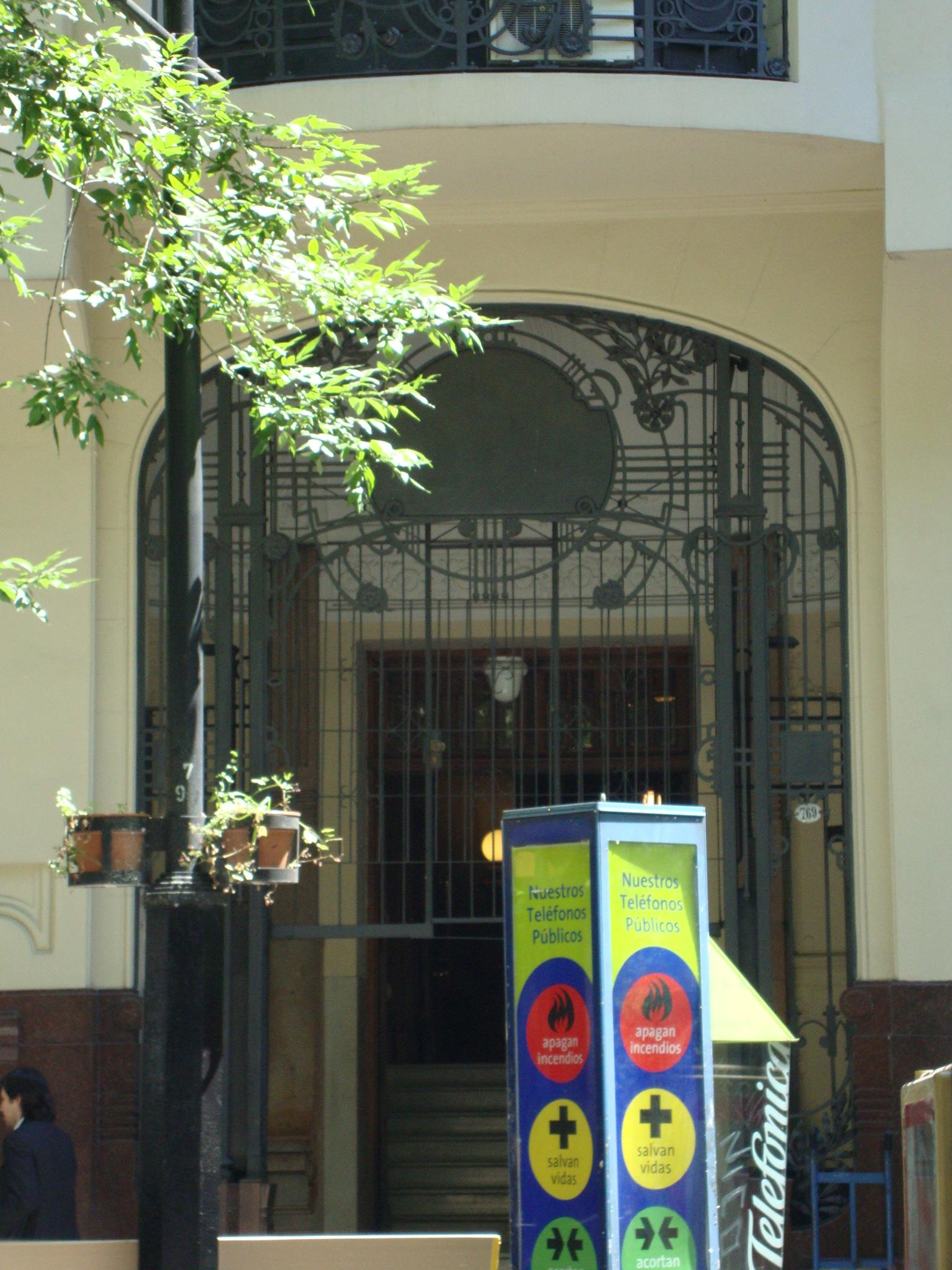 Reja de la entrada del Palacio Vera, ex residencia Díaz Vélez y ex Hotel Centenario. Avenida de Mayo nº 769.